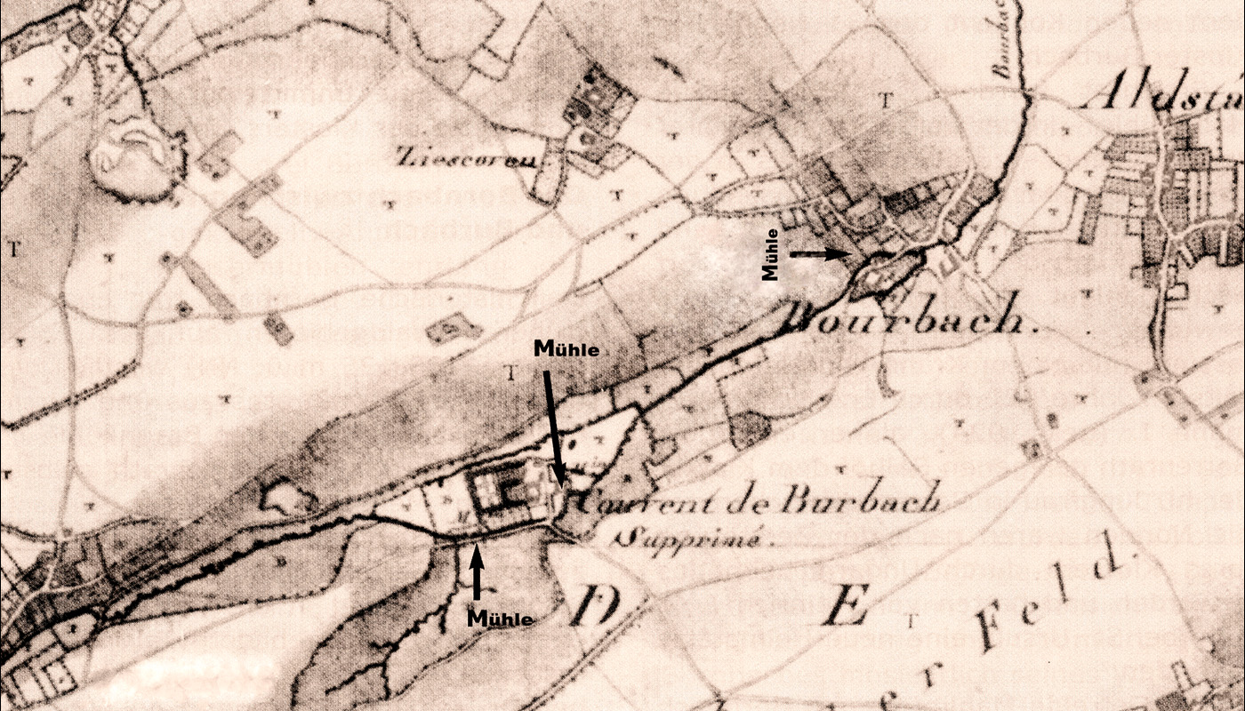 Hürth - Mühlen im Raum Hürth